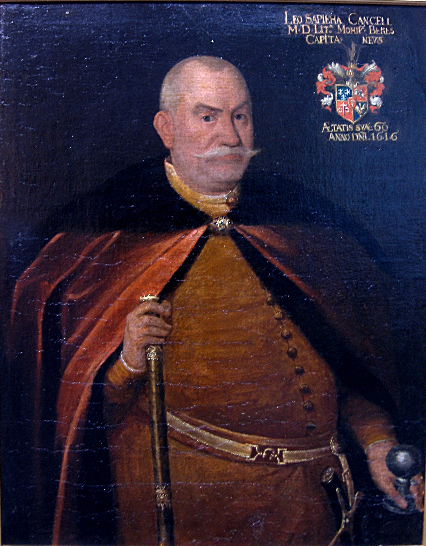 Партрэт Льва Сапегі Невядомы мастак, 1617 (?) г. Палатно, алей 102×79,5 см Нацыянальны гістарычны музей Рэспублікі Беларусь